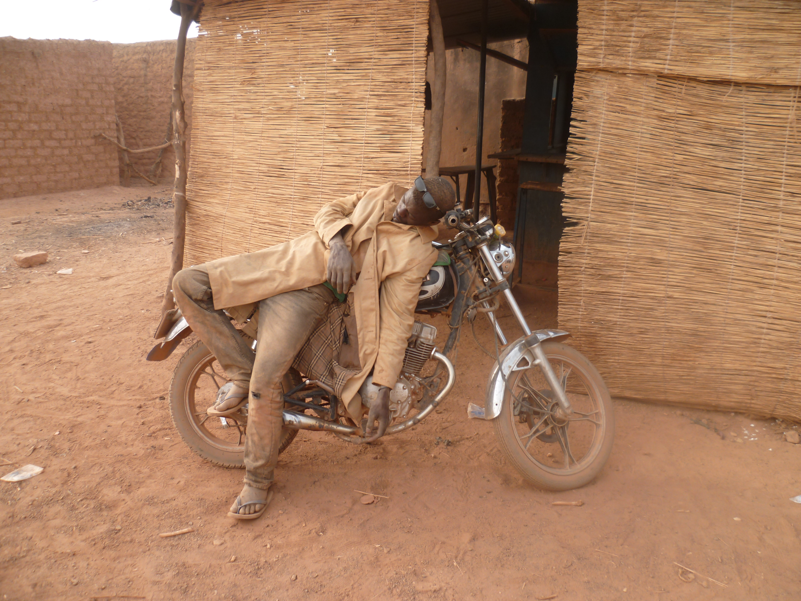 Burkina Faso - Guibaré - Un orpailleur, très fatigué, dort sur son 2 roues devant un maquis. il porte sur lui les couleurs de la terre Burkinabé. This is an image with the theme "Africa on the Move or Transport" from: Burkina Faso